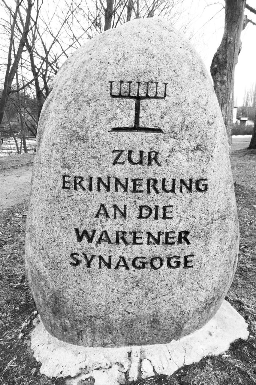 Gedenkstein für die Synagoge Waren (Müritz)